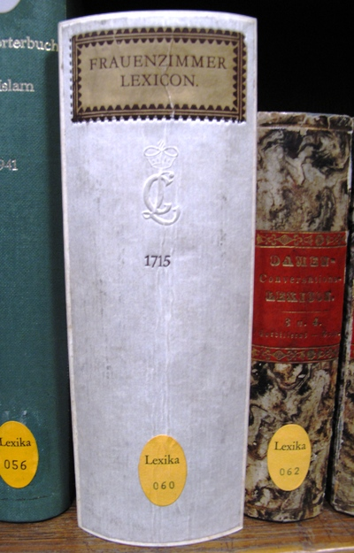 Frauenzimmer Lexicon - Originalausgabe von 1915, Deutsches Museum, München